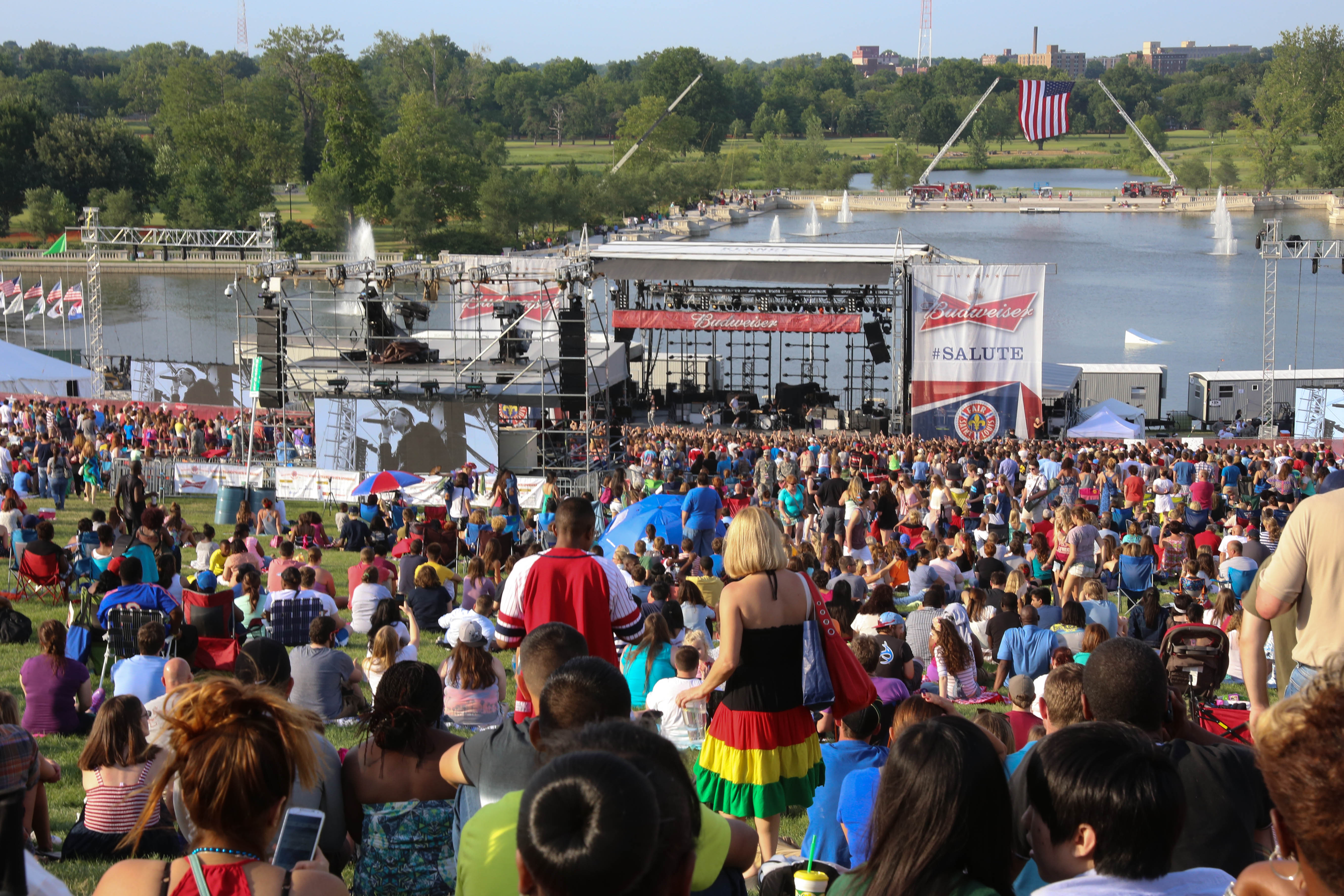 Art Hill